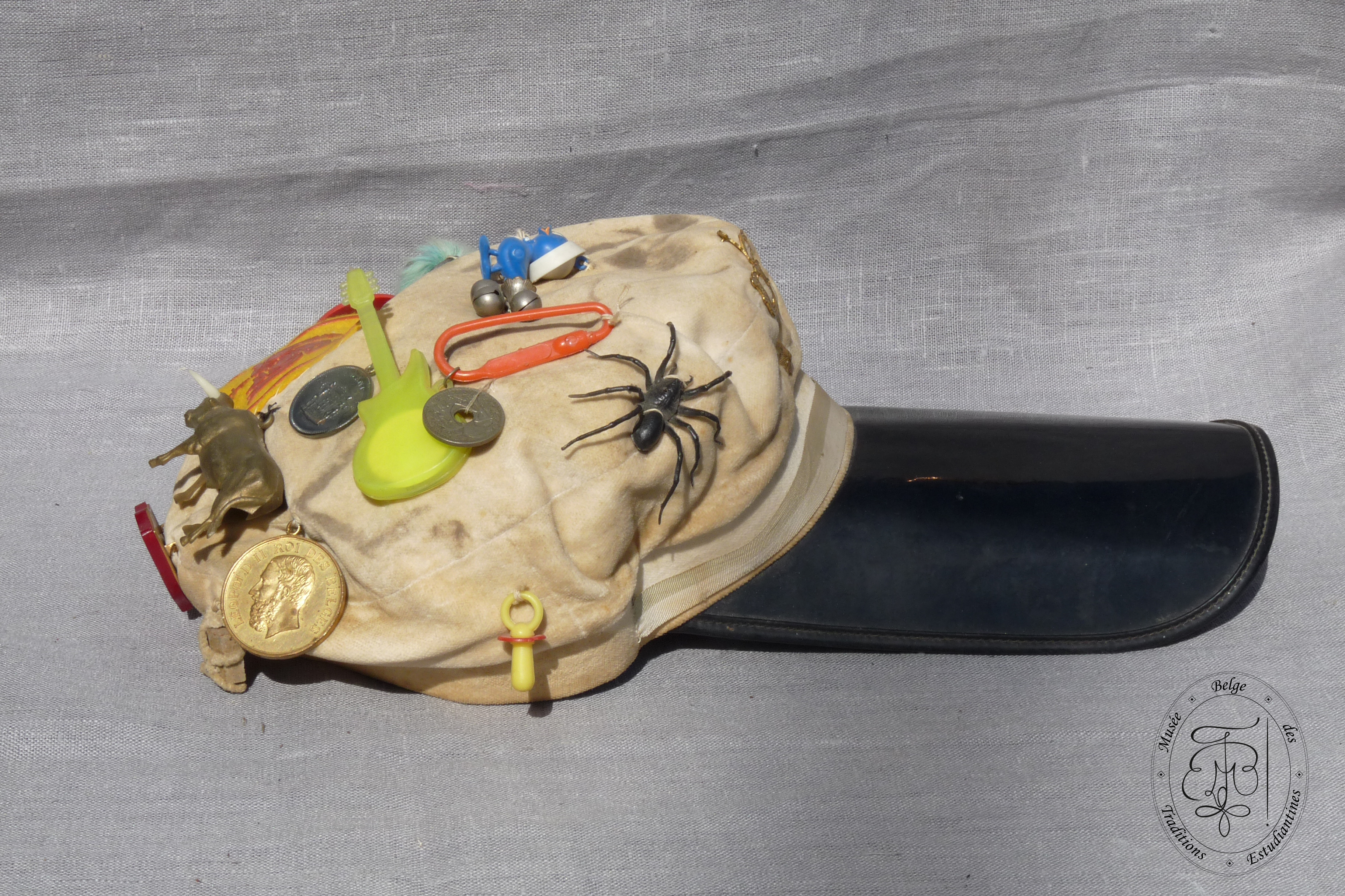 Penne d'étudiant en Philologie de l'université de Liège (portée par le professeur Robert Halleux dès 1964) Vue de côté Collection : Musée Belge des Traditions Estudiantines Don : Robert Halleux